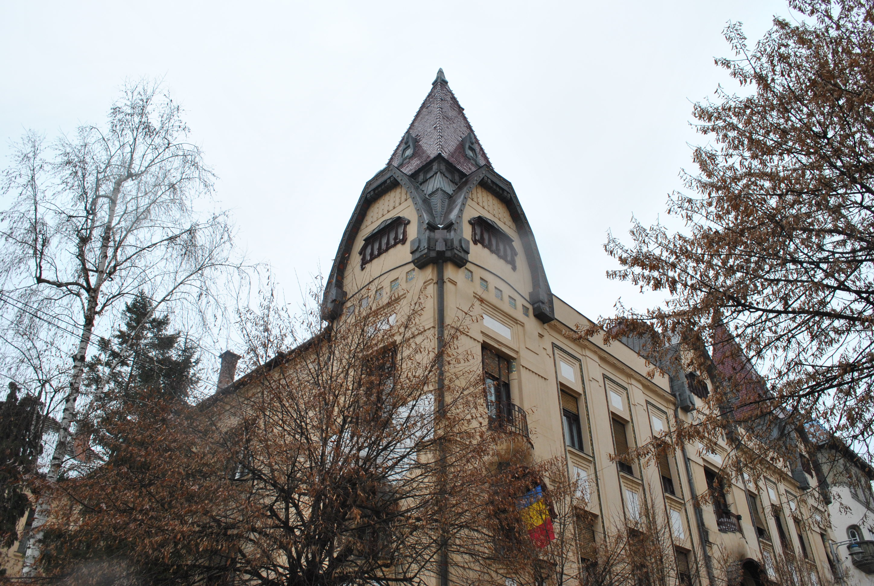 Palatul Pensionarilor, azi locuințe, 1909 - 1911